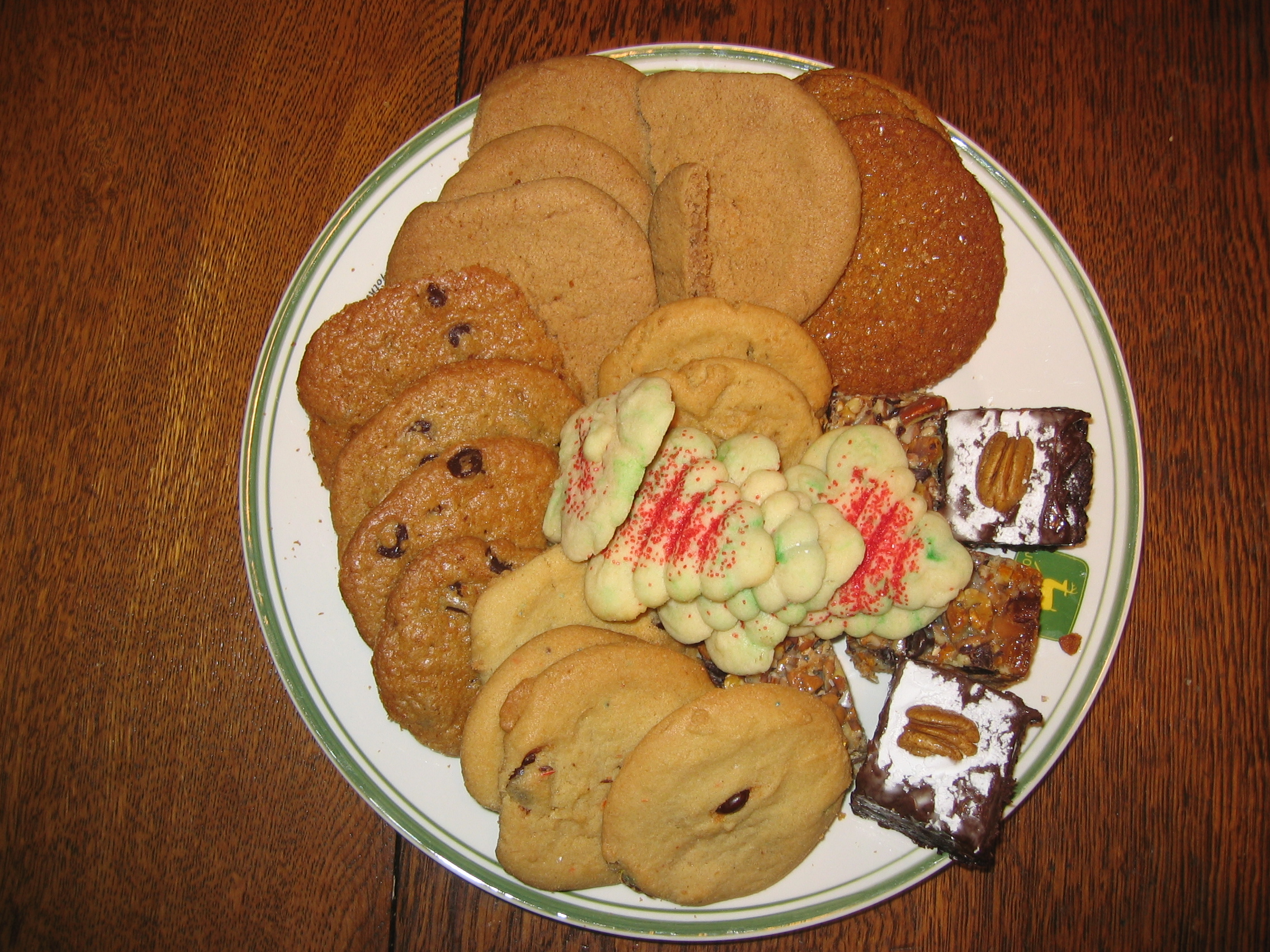 Cookie